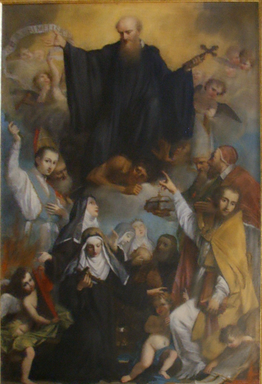 Peinture de Agostino Veracini, dans l'église Bartolomeo a ripoli